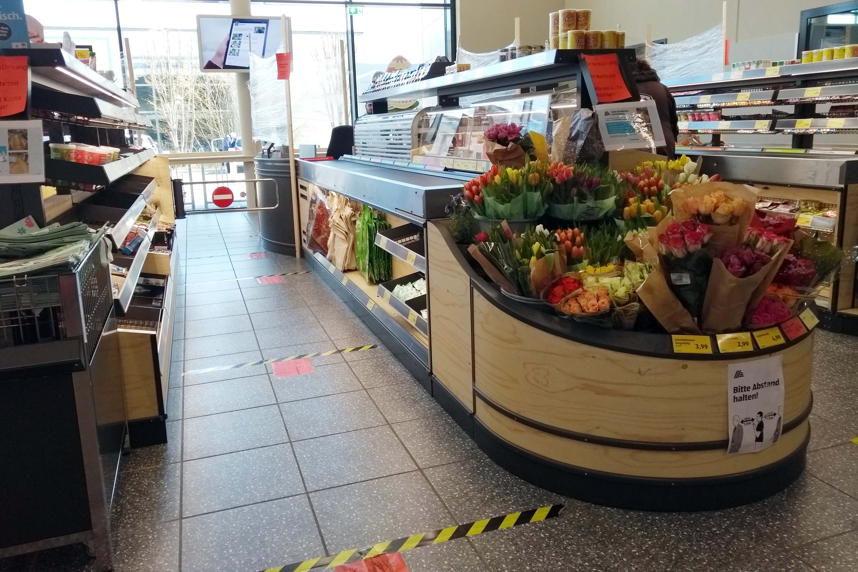 Hinweisschilder und Markierungen für Räumliche Distanz während der COVID-19-Pandemie bei einem Discounter